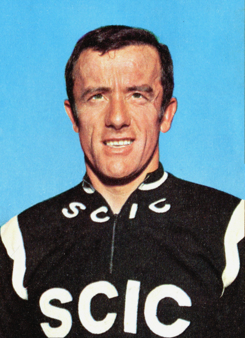 SPRINT '71 - PANINI - Figurina-Sticker n. 128 - ADRIANO DURANTE - ITALIA - Rec